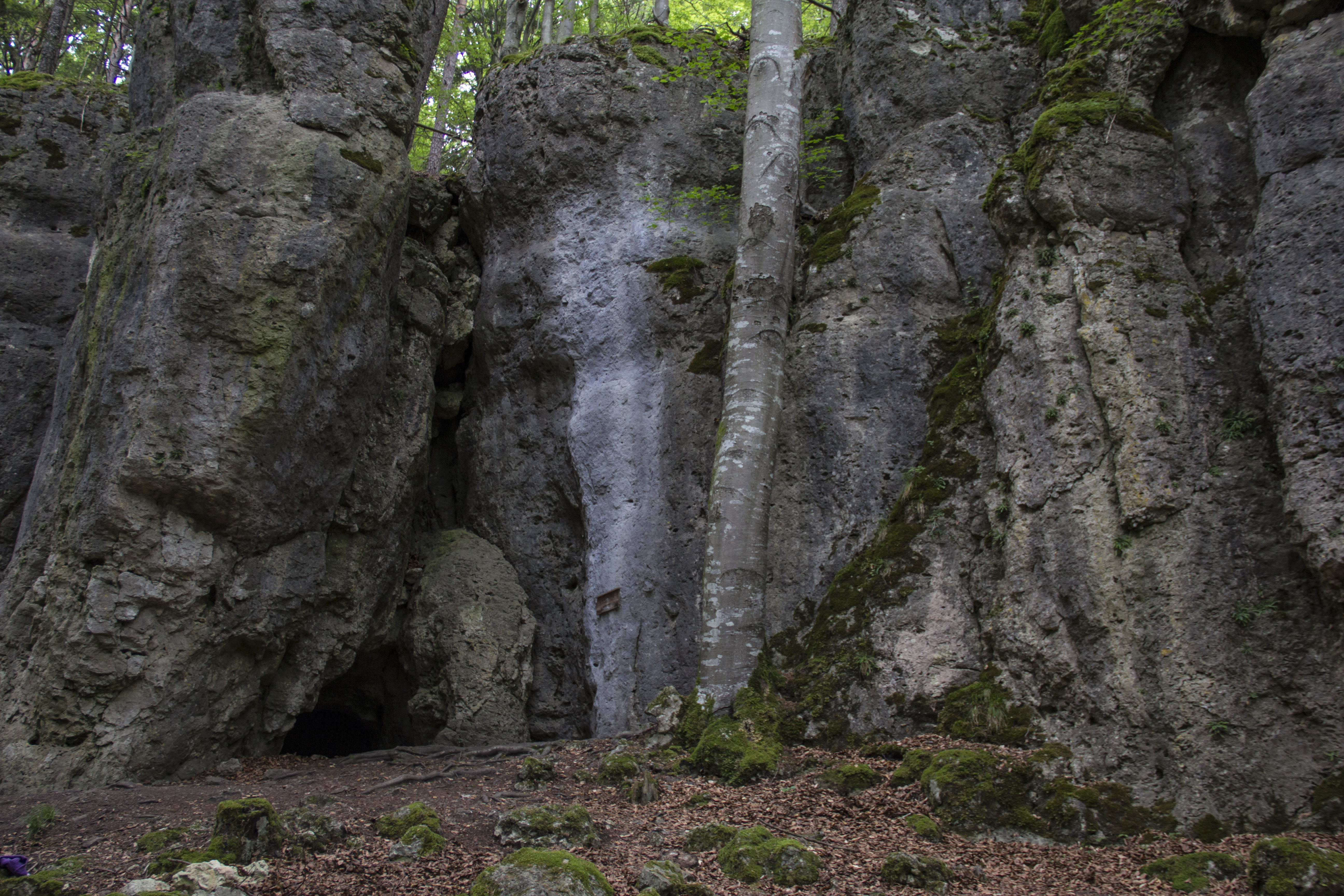 Saalburg, Plech, Geotop, Naturpark Fränkische Schweiz-Veldensteiner Forst